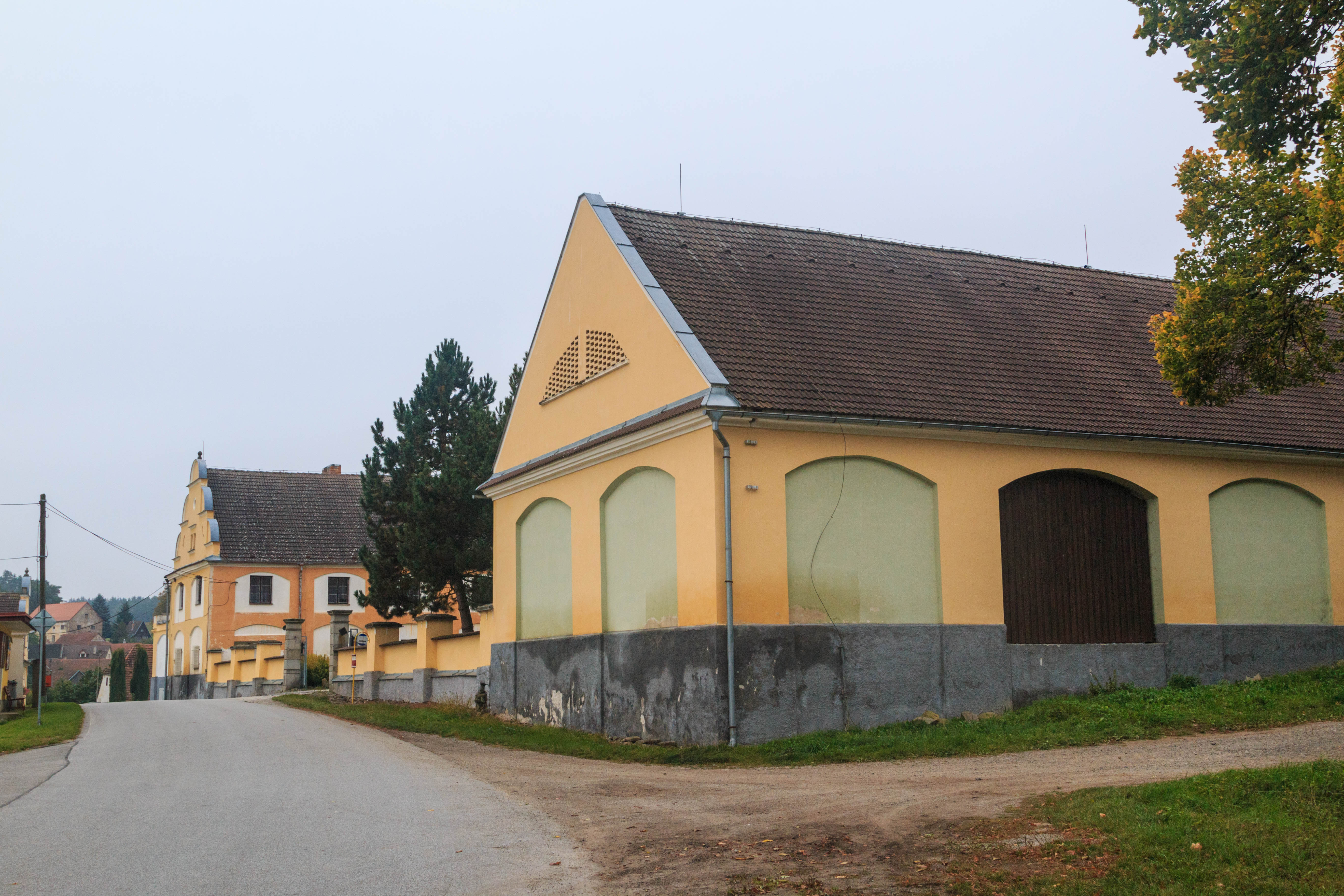 Čekanice - hospodářské budovy u zámku